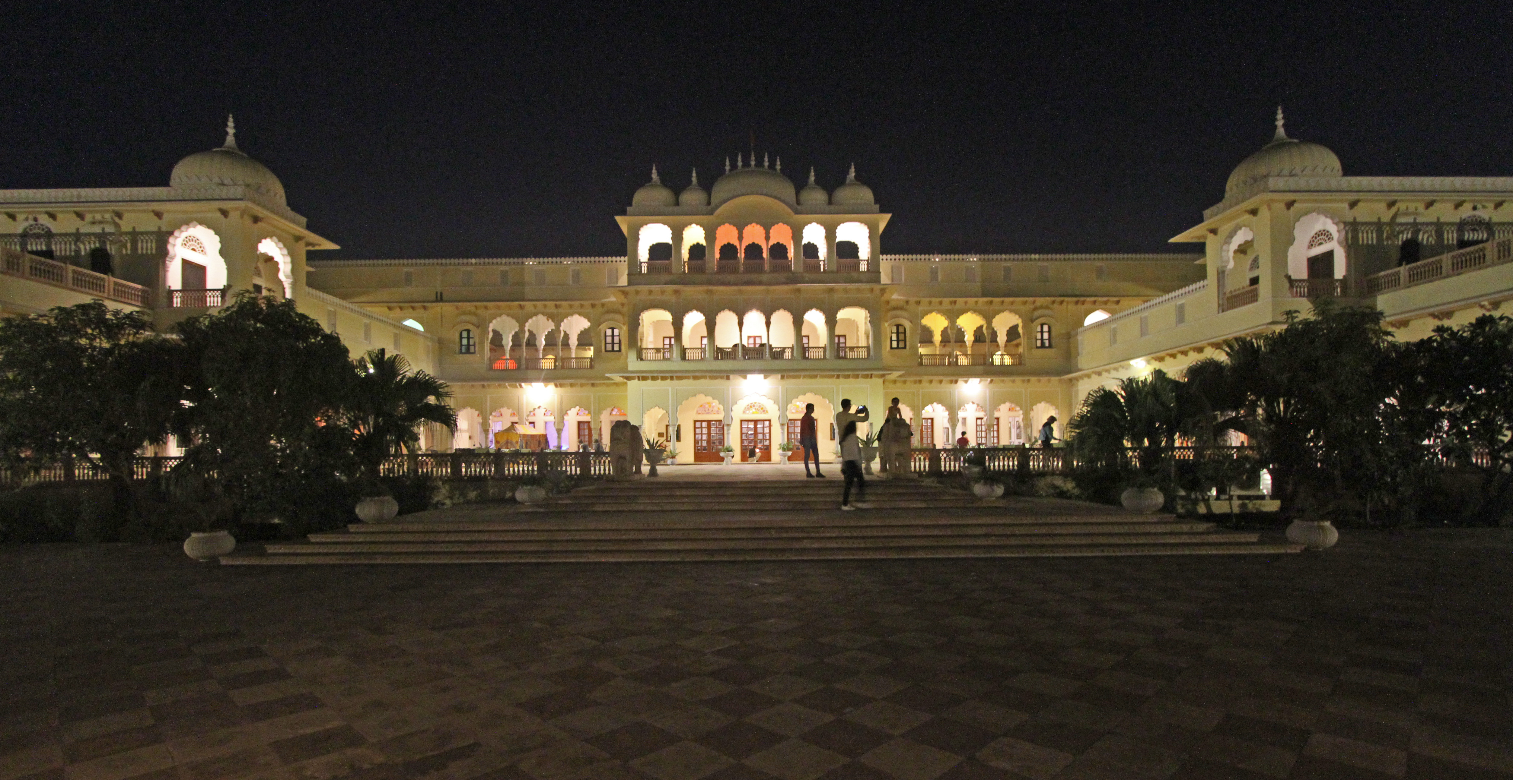 Laxmi Vilas Palace (Bharatpur)